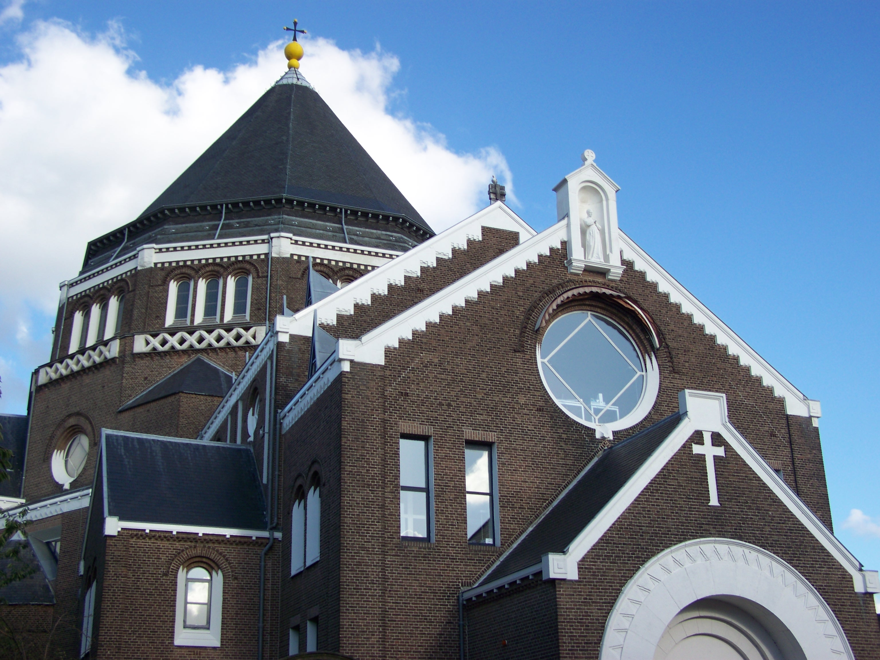 gerardus majellakerk narthex en toren, gezien vanaf obiplein, 18 augustus 2010